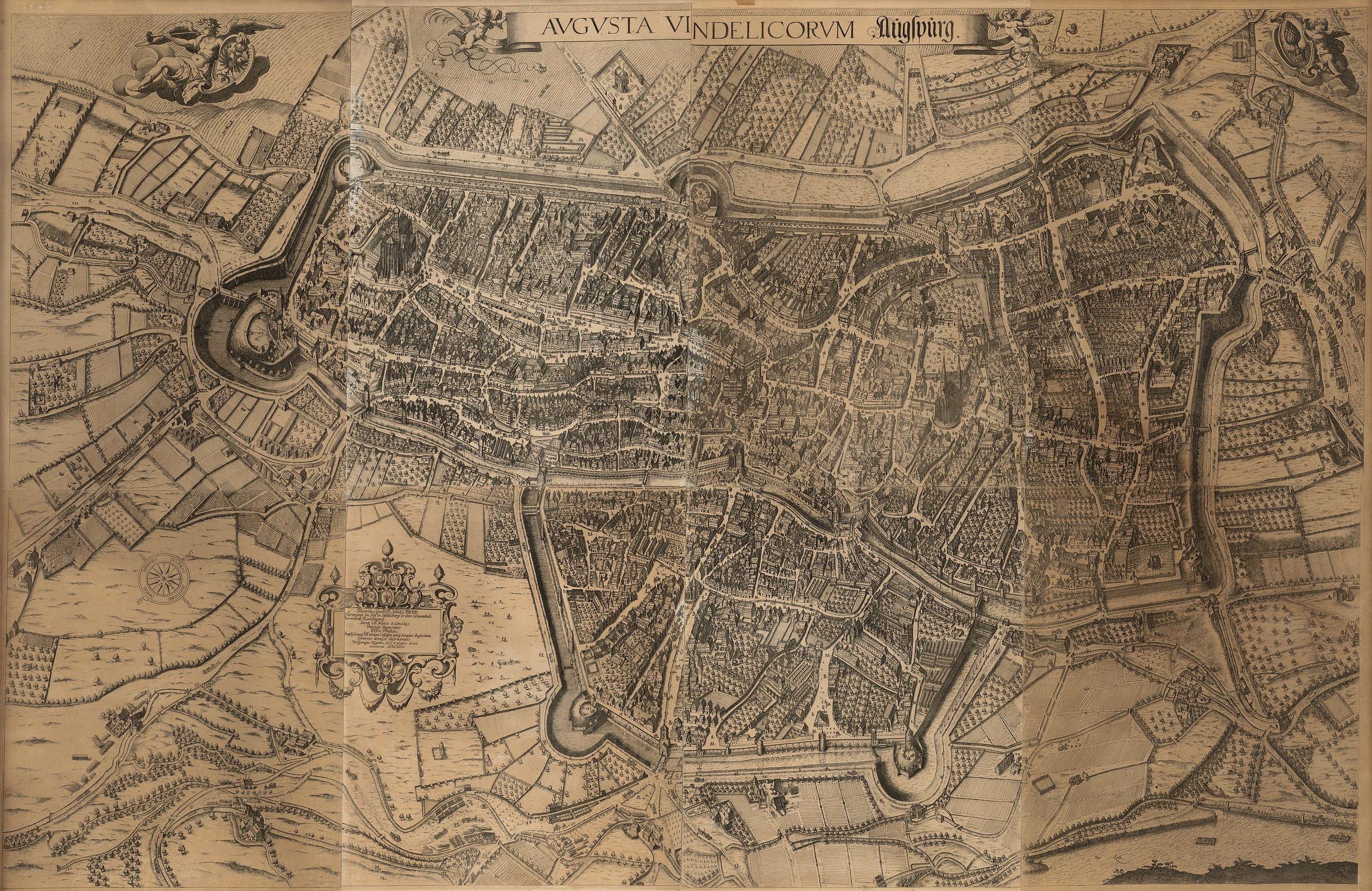 Stadtplan „Kilianplan“ von Augsburg, achtteilig